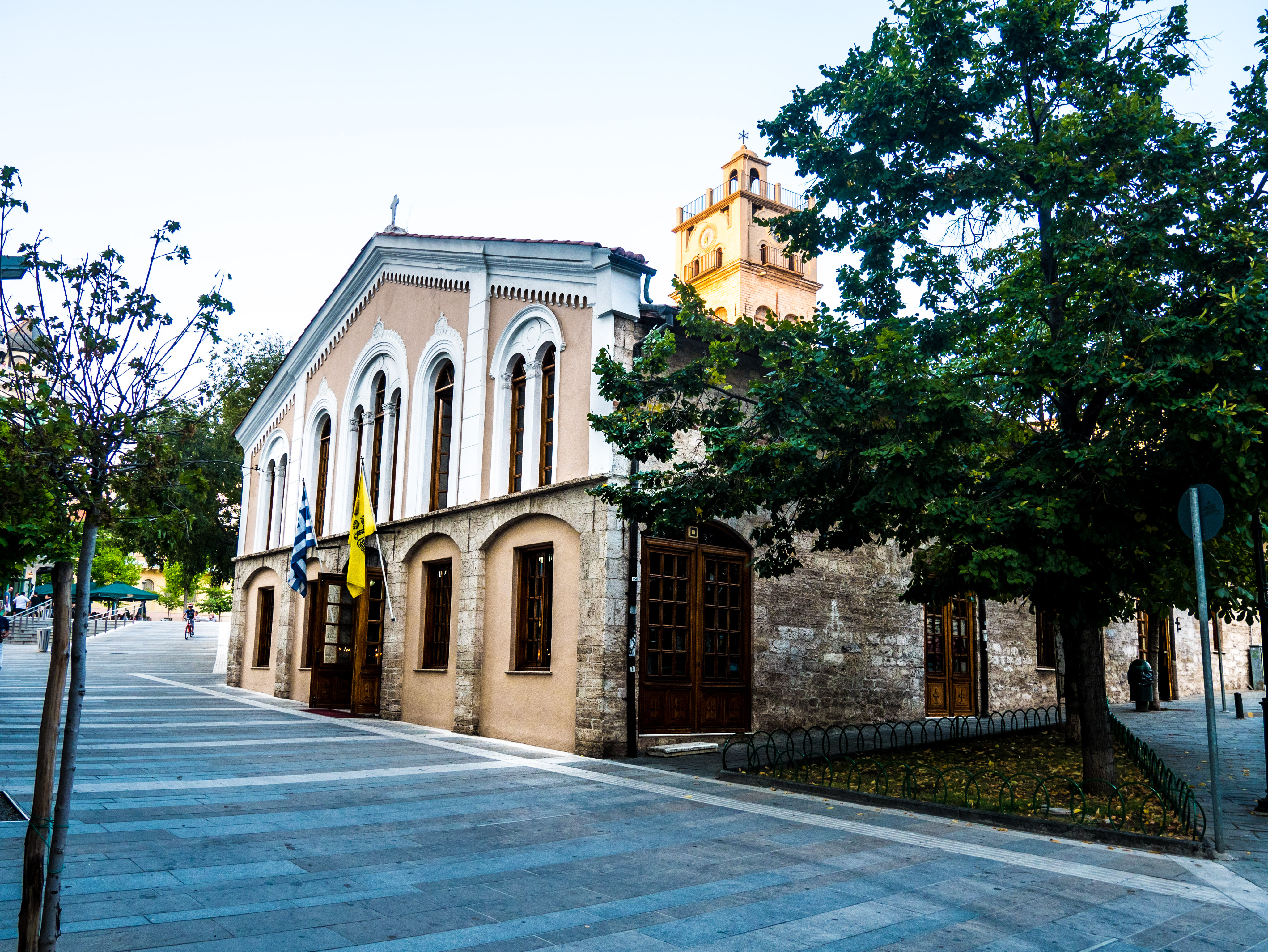 Ναός Αγίου Νικολάου Κοζάνης«Ναός Αγίου Νικολάου Κοζάνης»